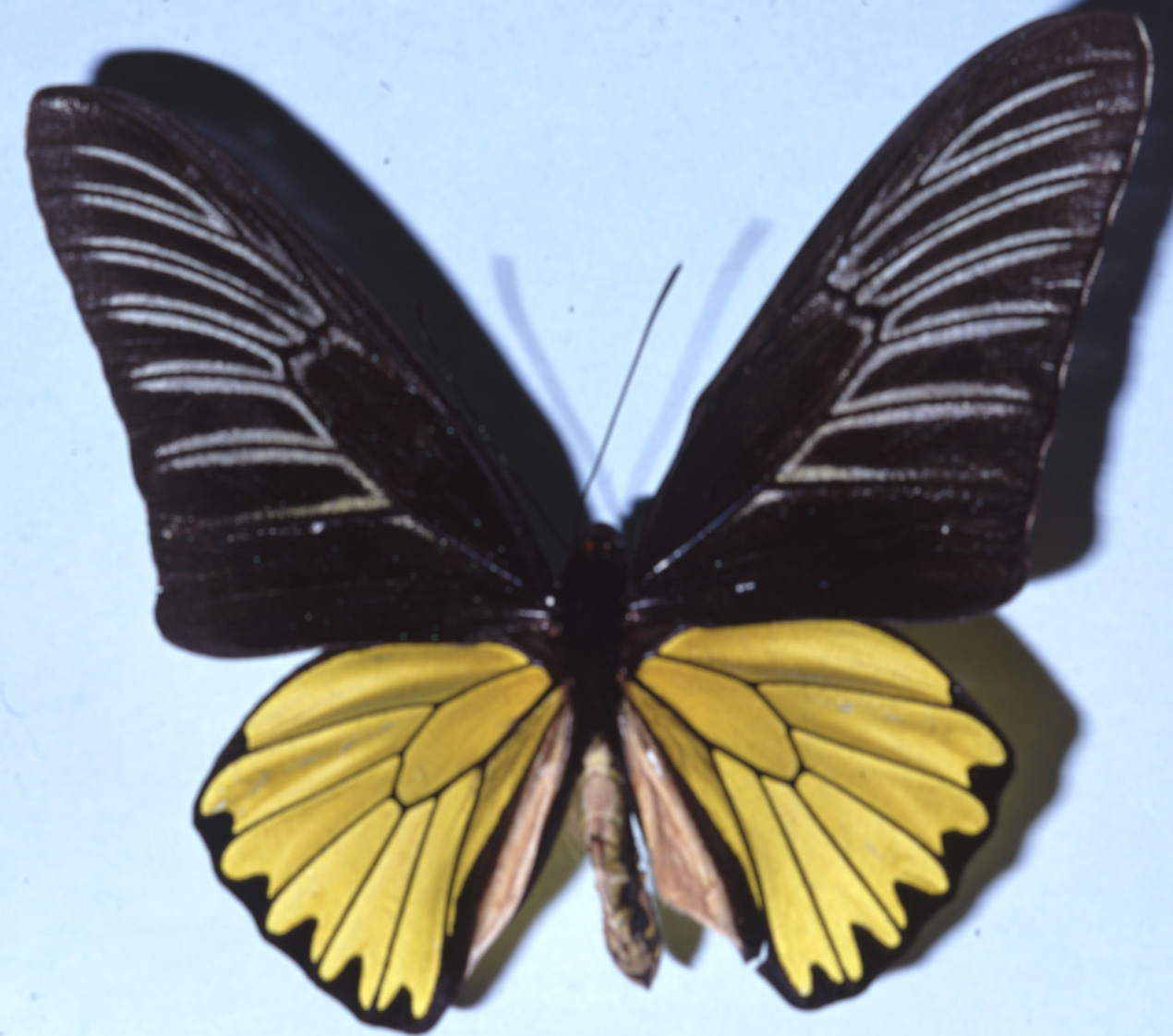 Troides magellanus Male upperside